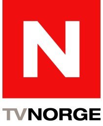 logo de la chaîne TVNorge